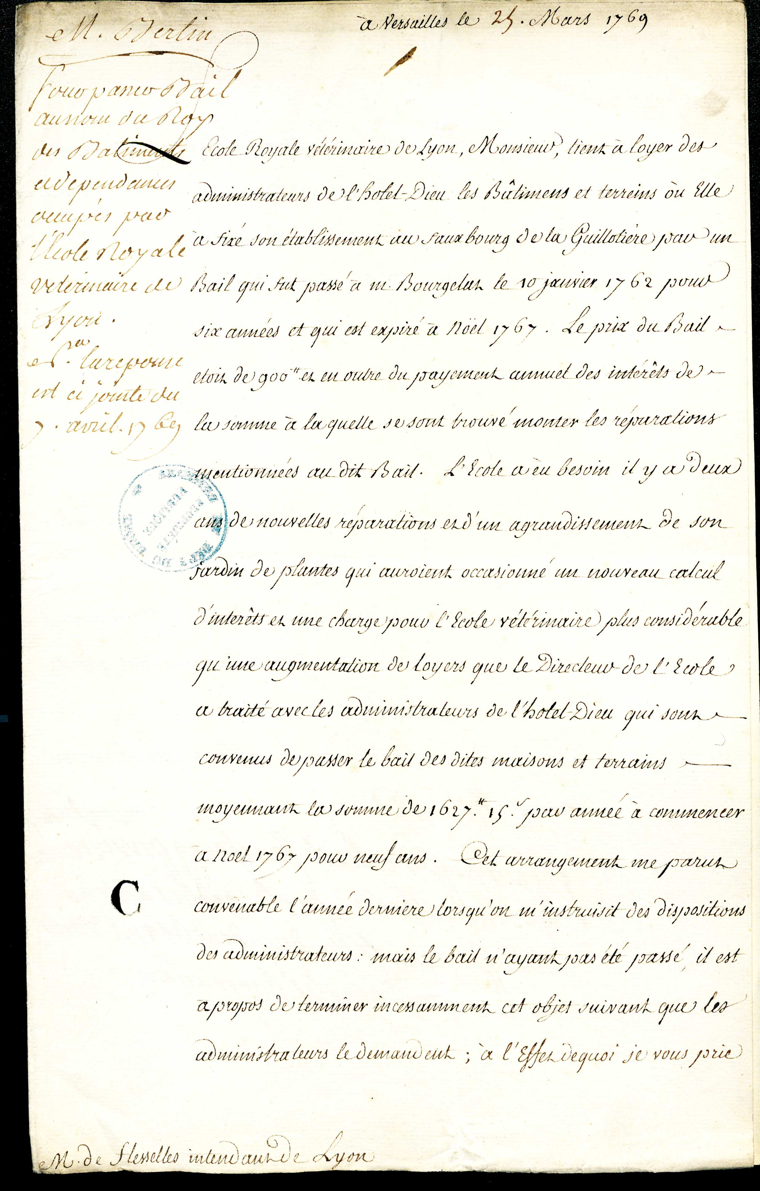 ADRML, cote : 1 C 192